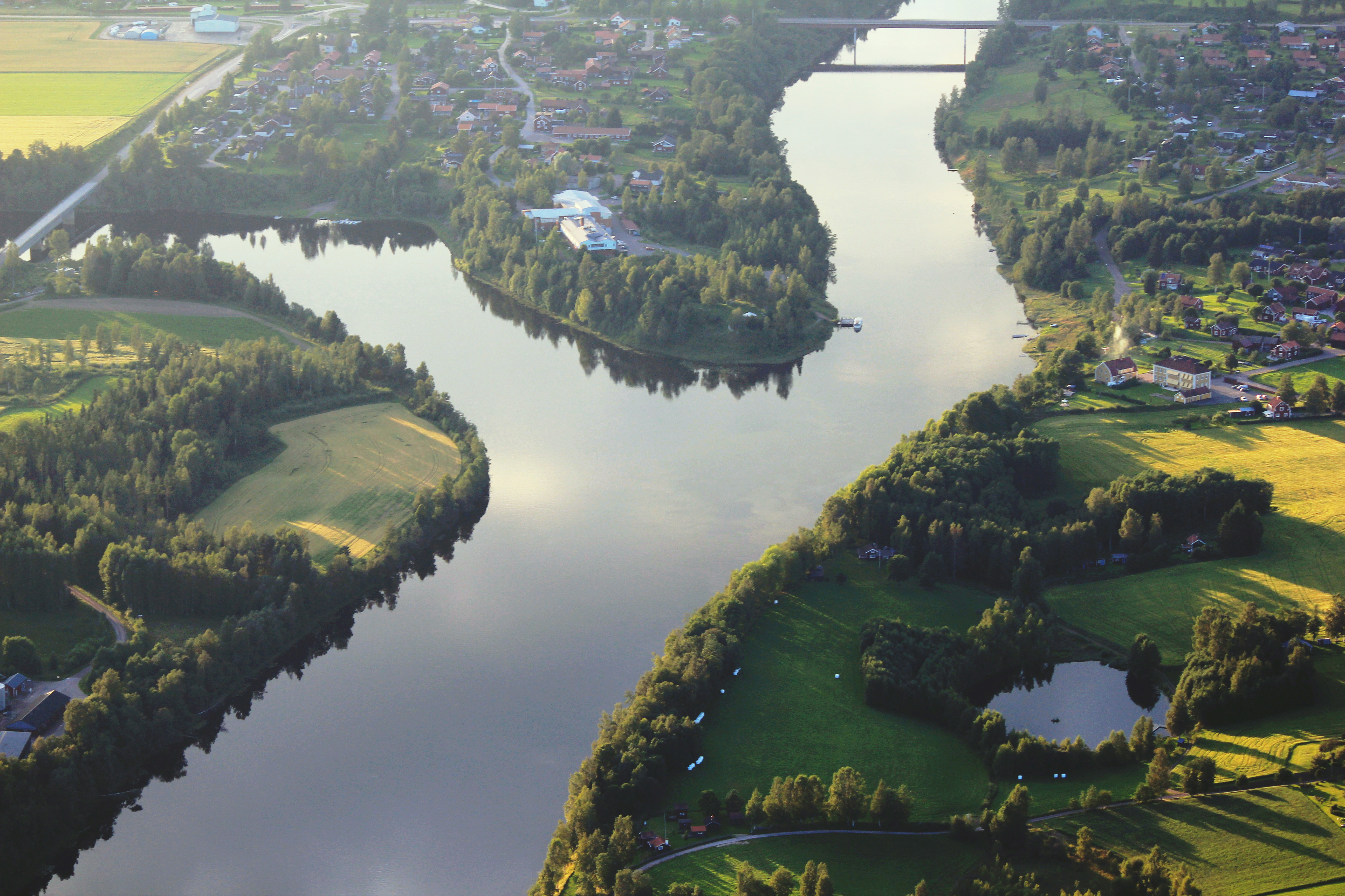 Flygfoto över Älvmötet i Djurås, Gagnefs kommun, Dalarnas län, Sverige This aerial photograph has been approved for publishing by the Swedish Armed Forces with the ID: FMTM 10 830:11043 This tag does not indicate the copyright status of the attached work. A normal copyright tag is still required. See Commons:Licensing for more information.